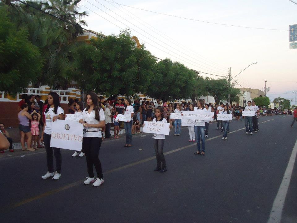 Desfile Cívico do dia da Cidade de Cajazeiras